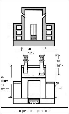 תרגום שלי של קובץ מויקי באנגלית ברישיון GNU רישיון נוצר במקור על ידי ותורגם על ידי משתמש:Deroravi